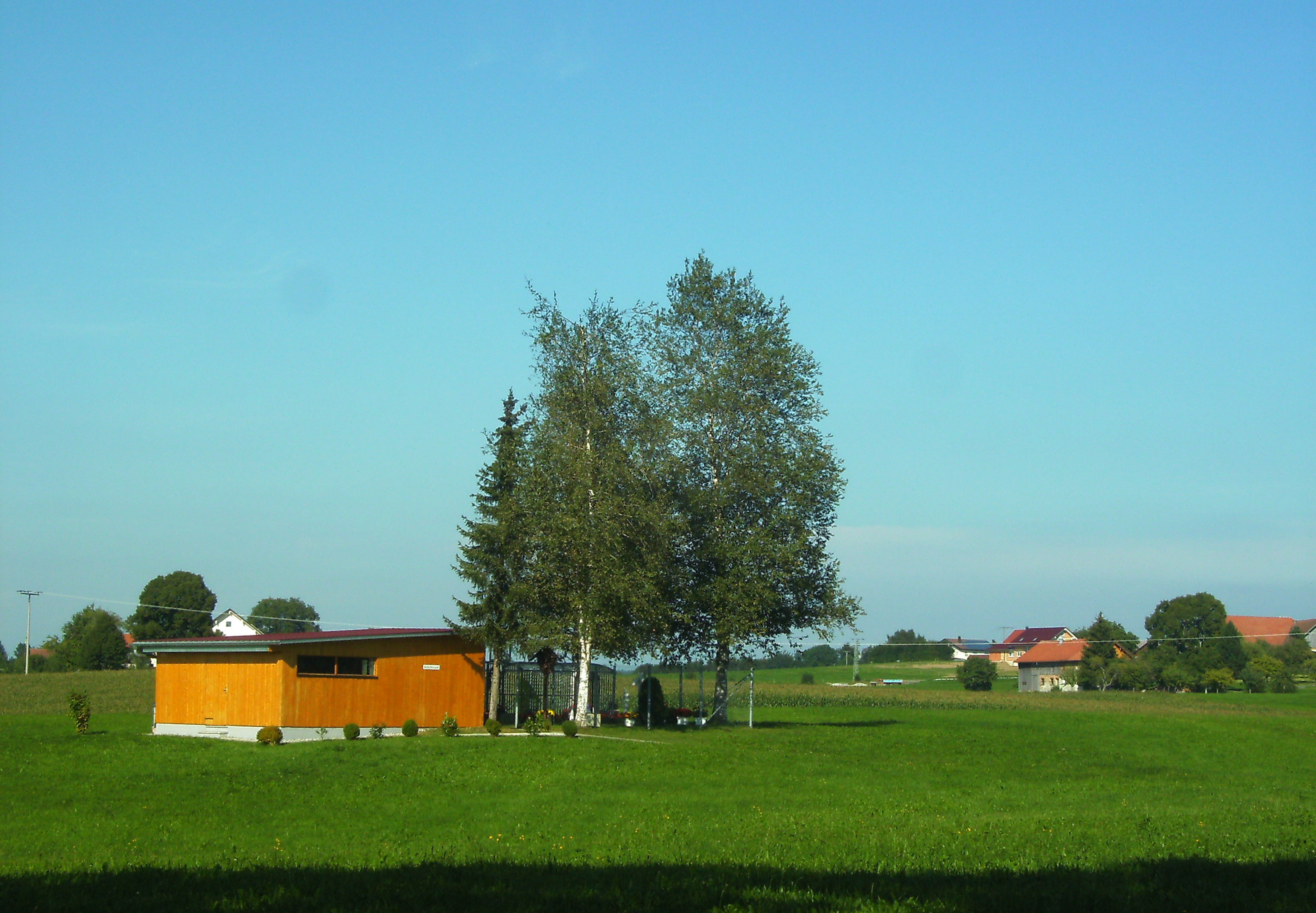 Argenbühl, Landkreis Ravensburg: Angebliches Rasenkreuz bei Meggen